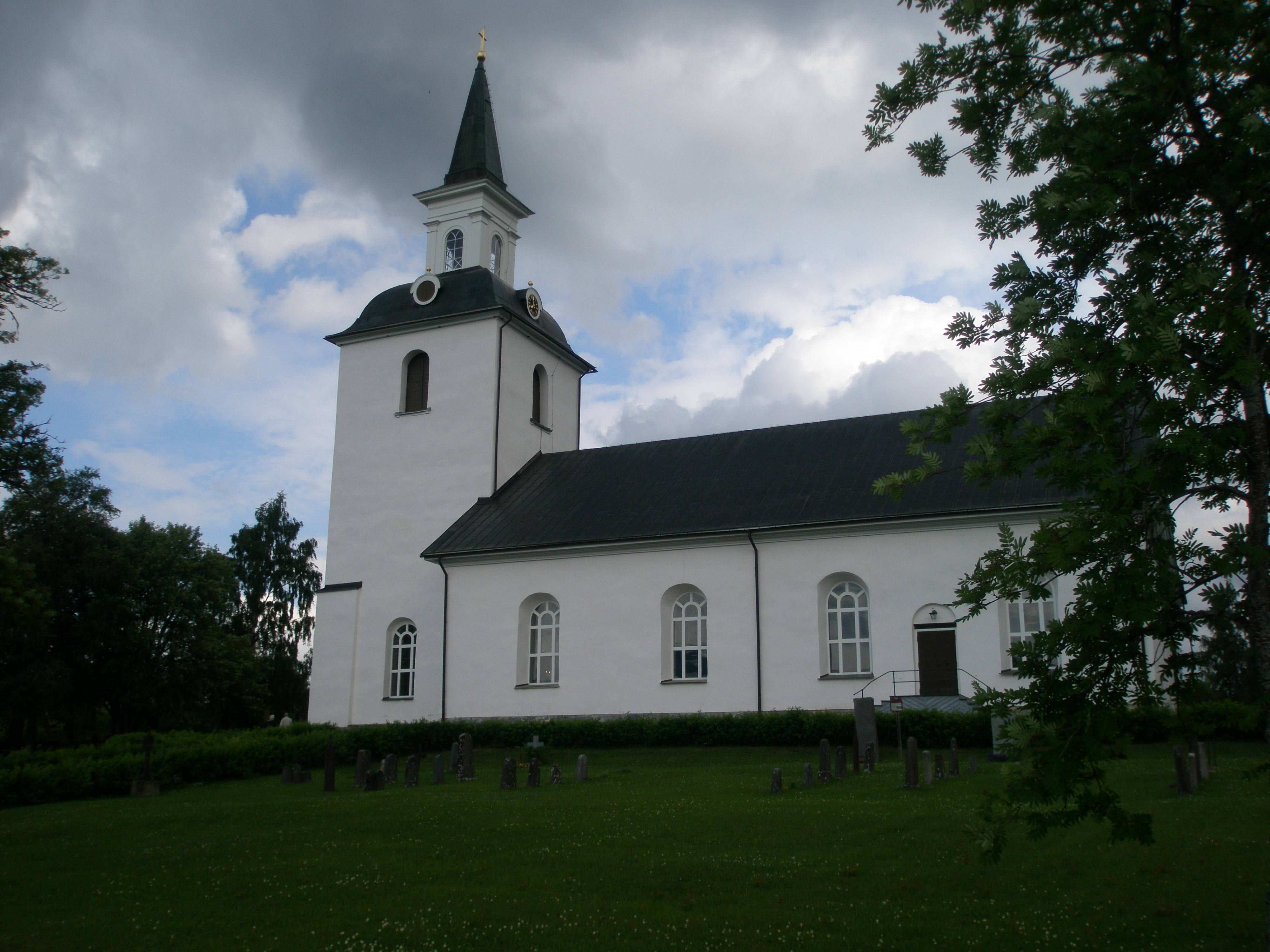 Offerdals kyrka i Ede, Offerdals socken, Krokoms kommun, Jämtland, Sverige.